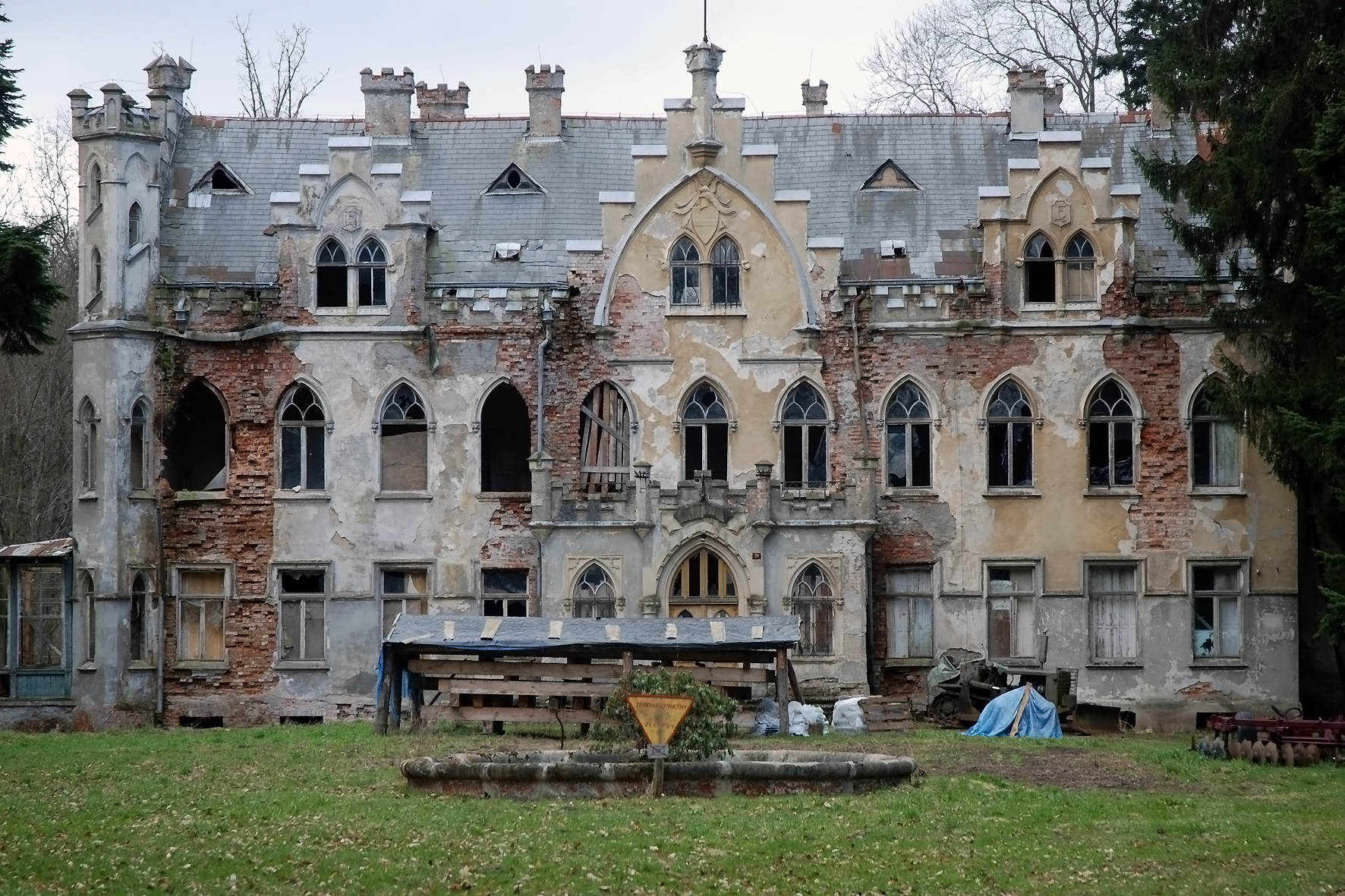 Podwilcze - pałac